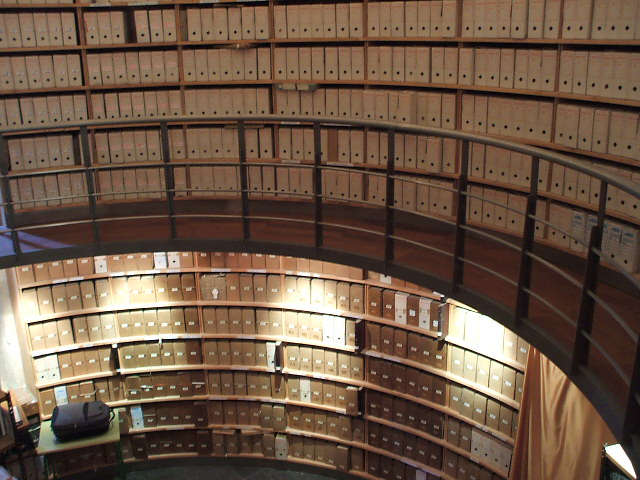 Archivo de los Duques de Alburquerque en el castillo de Cuéllar.